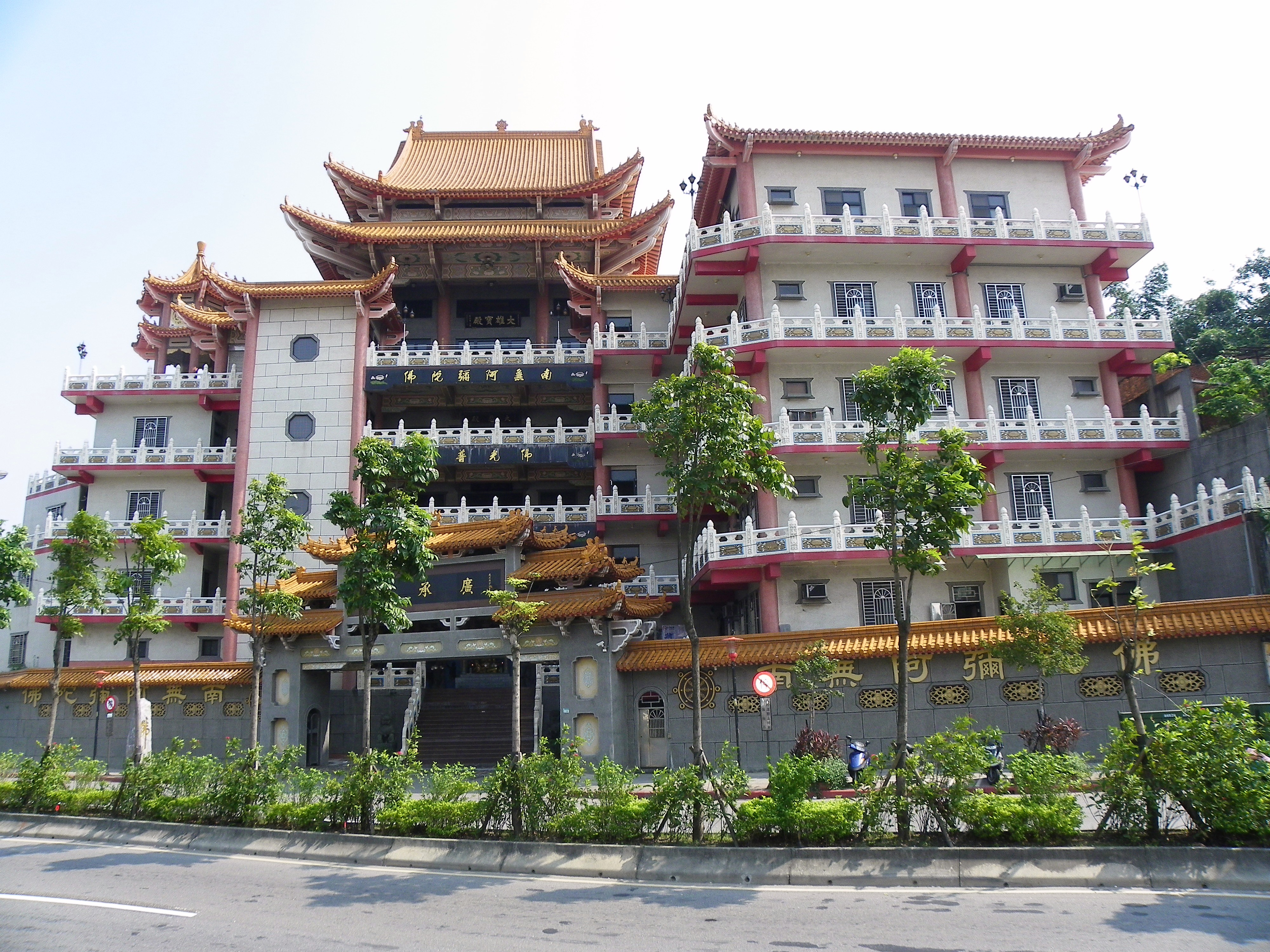 新北市土城區廣承岩寺正面。